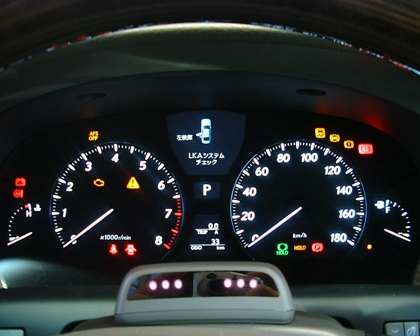 レクサスLSのオプティトロンメーター。本人撮影。 Lexus display, with Driver Monitoring System used in both the LS and GS.